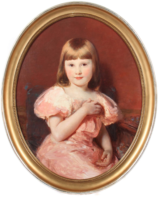 Bildnis eines blonden Mädchens mit rosafarbenem Kleid